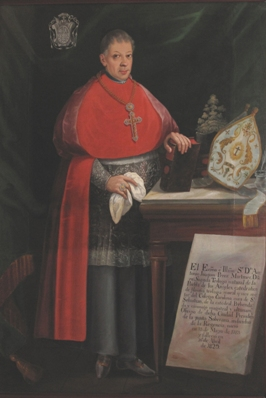 Retrato de Antonio Joaquín Pérez Martínez (1763-1829), obispo de Puebla de los Ángeles (1763-1829).